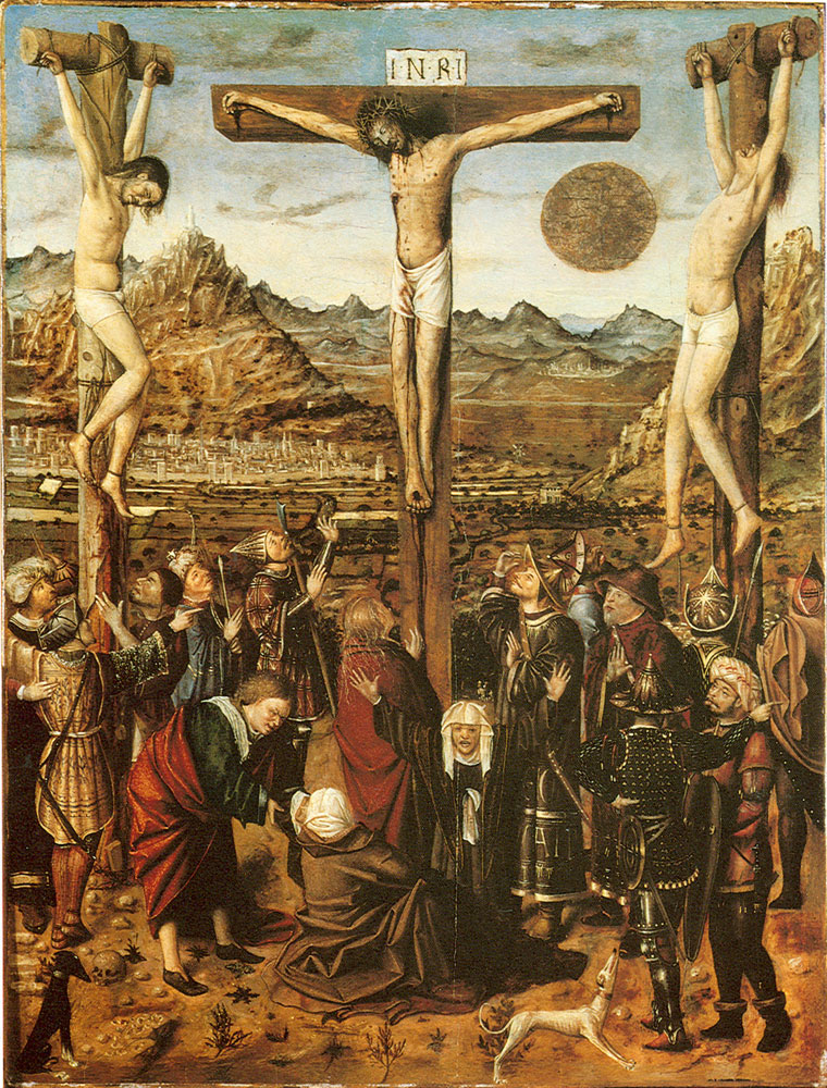 Crucifixion